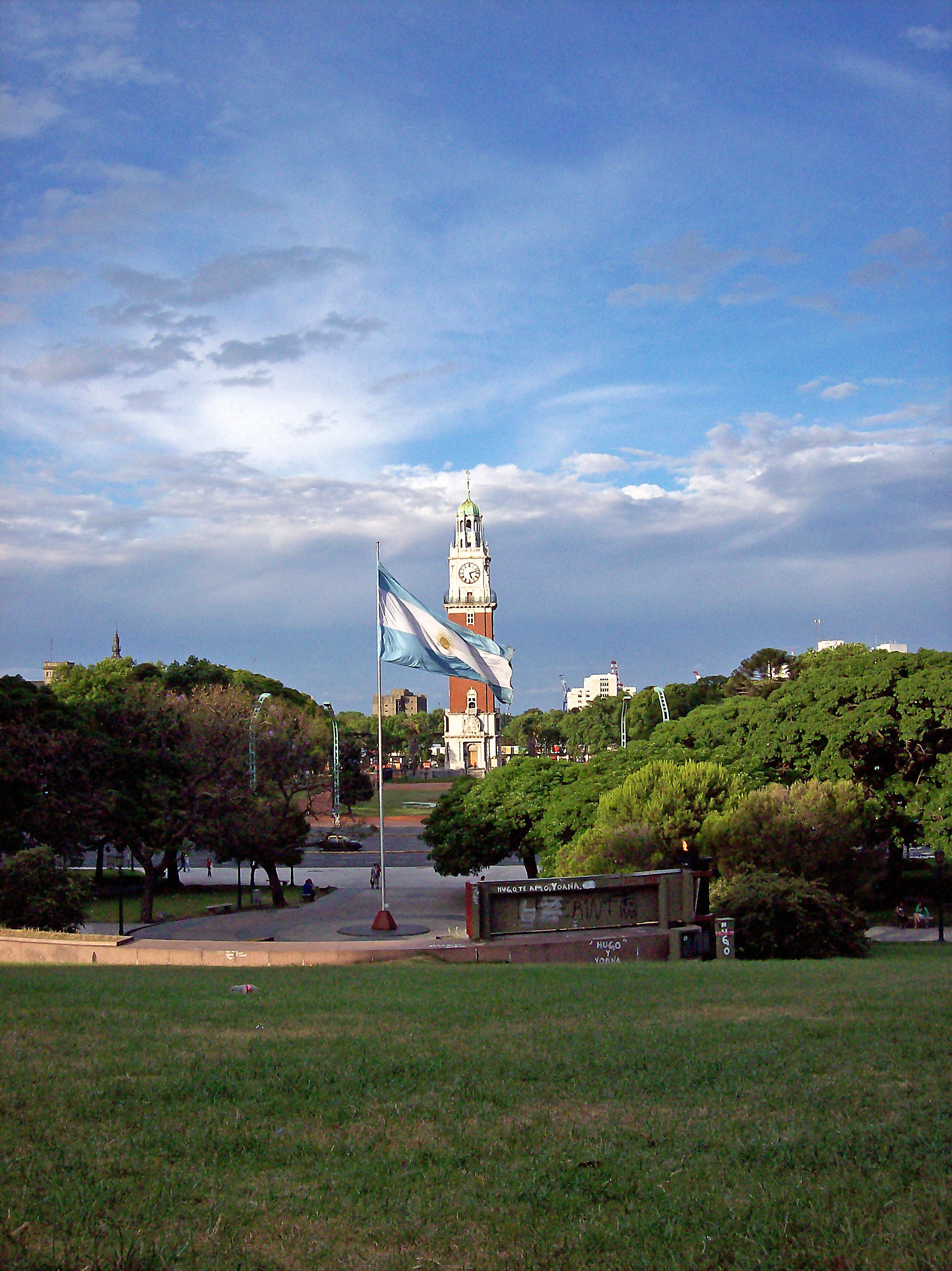 Monumento a lo caídos en las Malvinas, en Plaza San Martín ,Buenos Aires y la Torre Monumental (antigua Torre de los Ingleses)